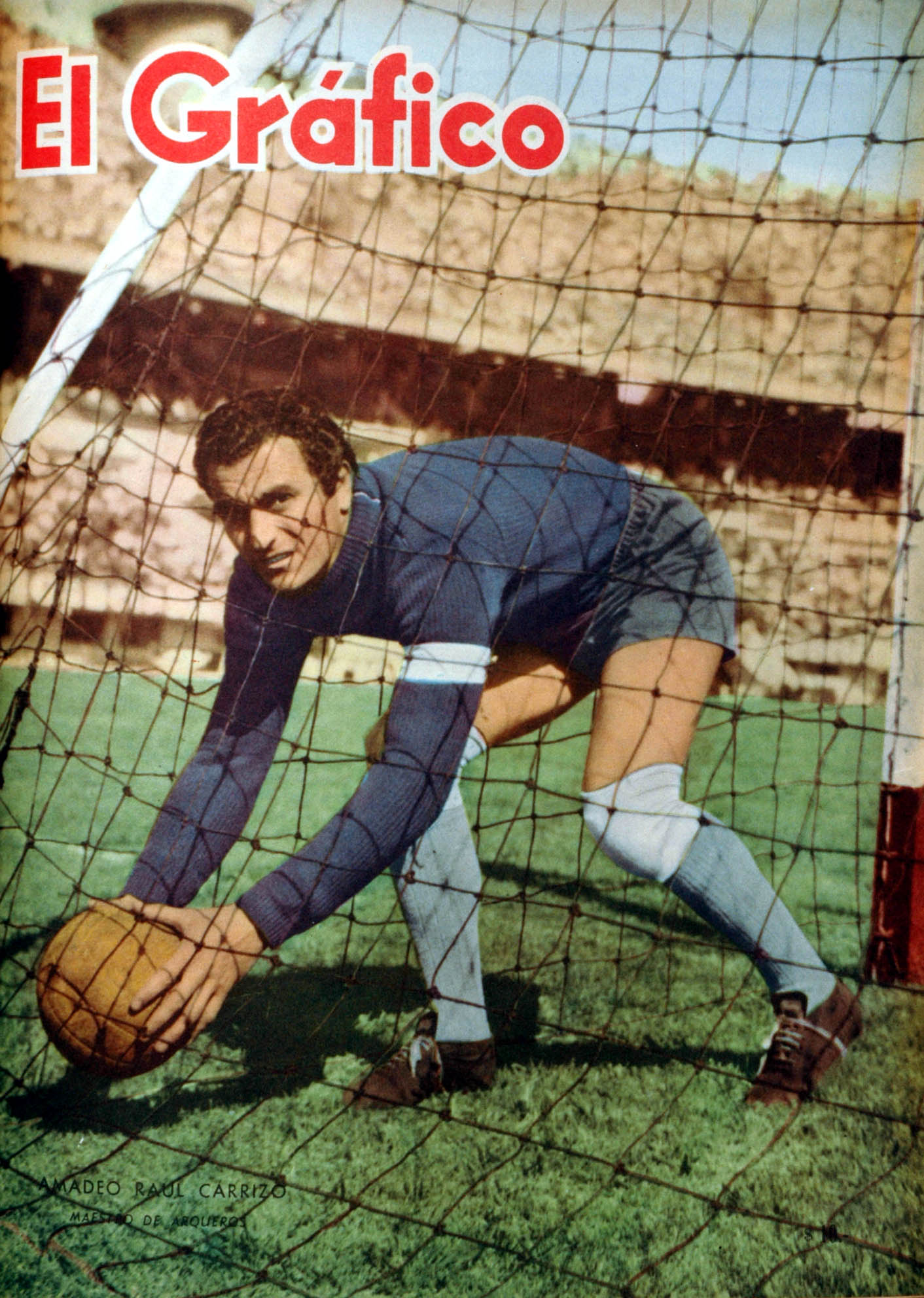 El Grafico del 16 de Noviembre de 1960. Edicion 2147